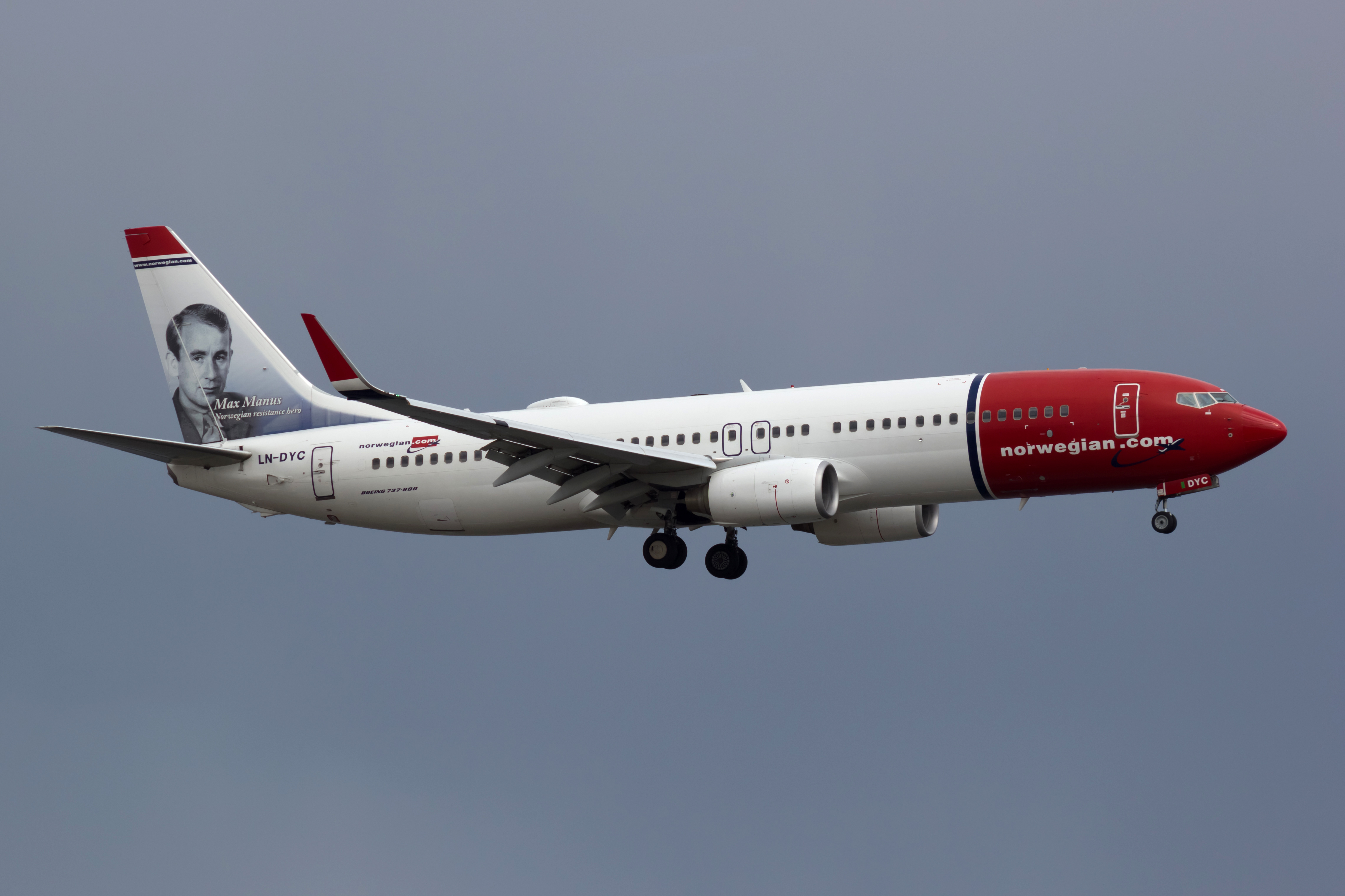 Boeing 737 de Norwegian aterrando no aeroporto de Estocolmo-Arlanda.